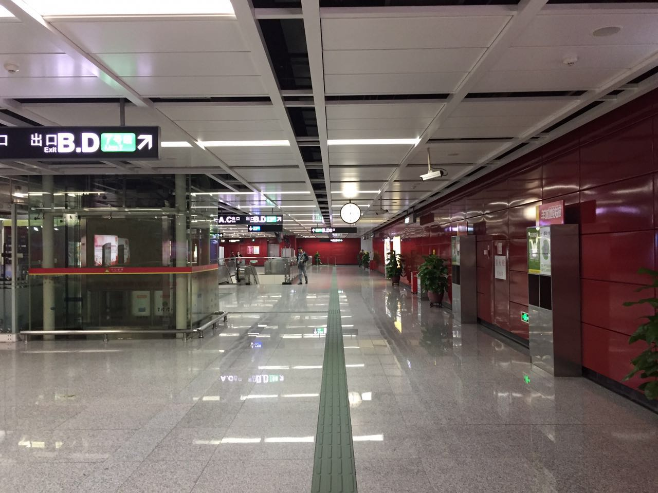 广州地铁石壁站